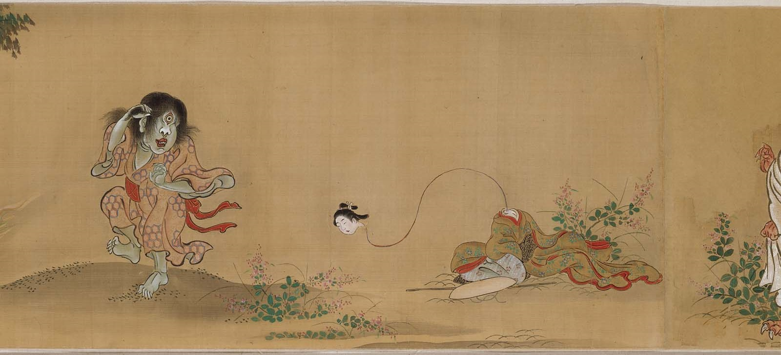 Version du Hyakki Hyagyo Emaki par Toriyama Sekien entreposée au Musée des beaux-arts de Boston